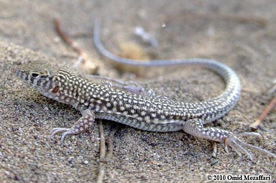 Acanthodactylus blanfordii